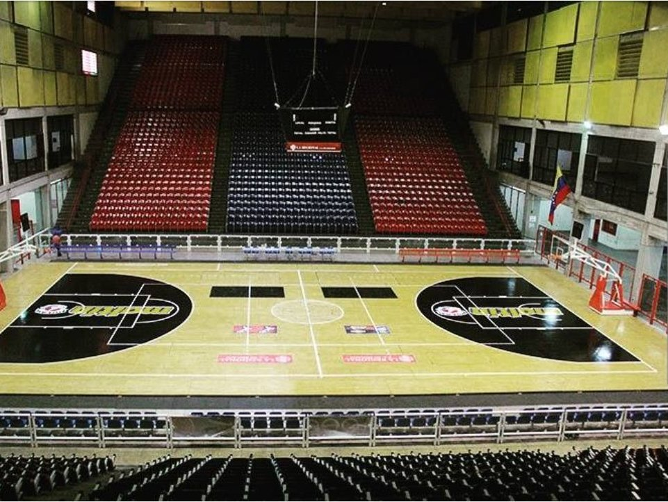 coliseo el limon